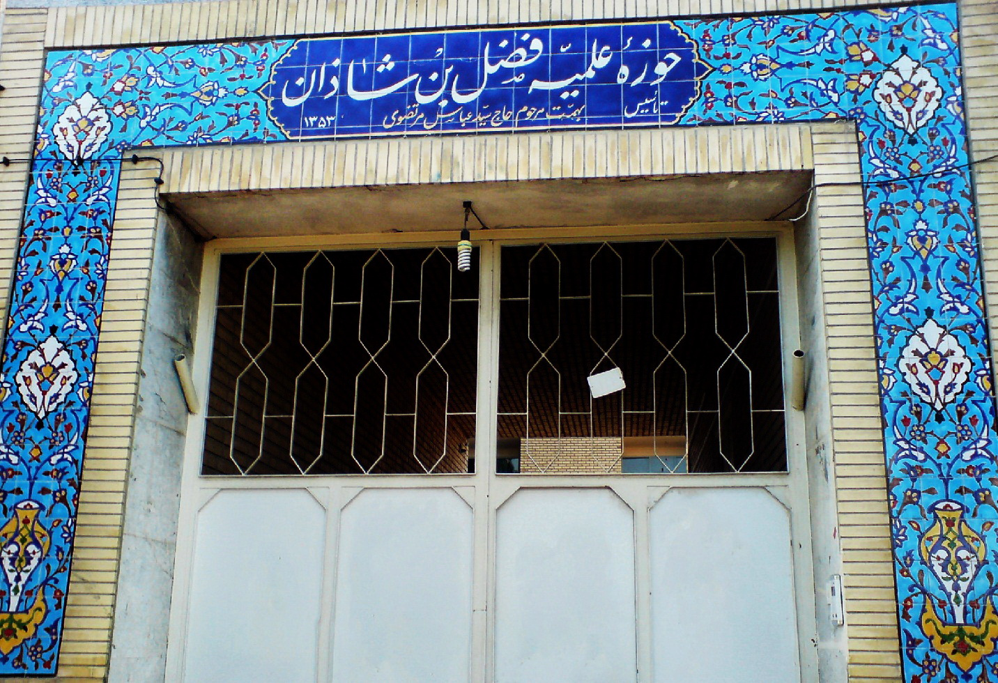 Fazl Ibn Shazan Madrasa( Hawza ) in Nishapur